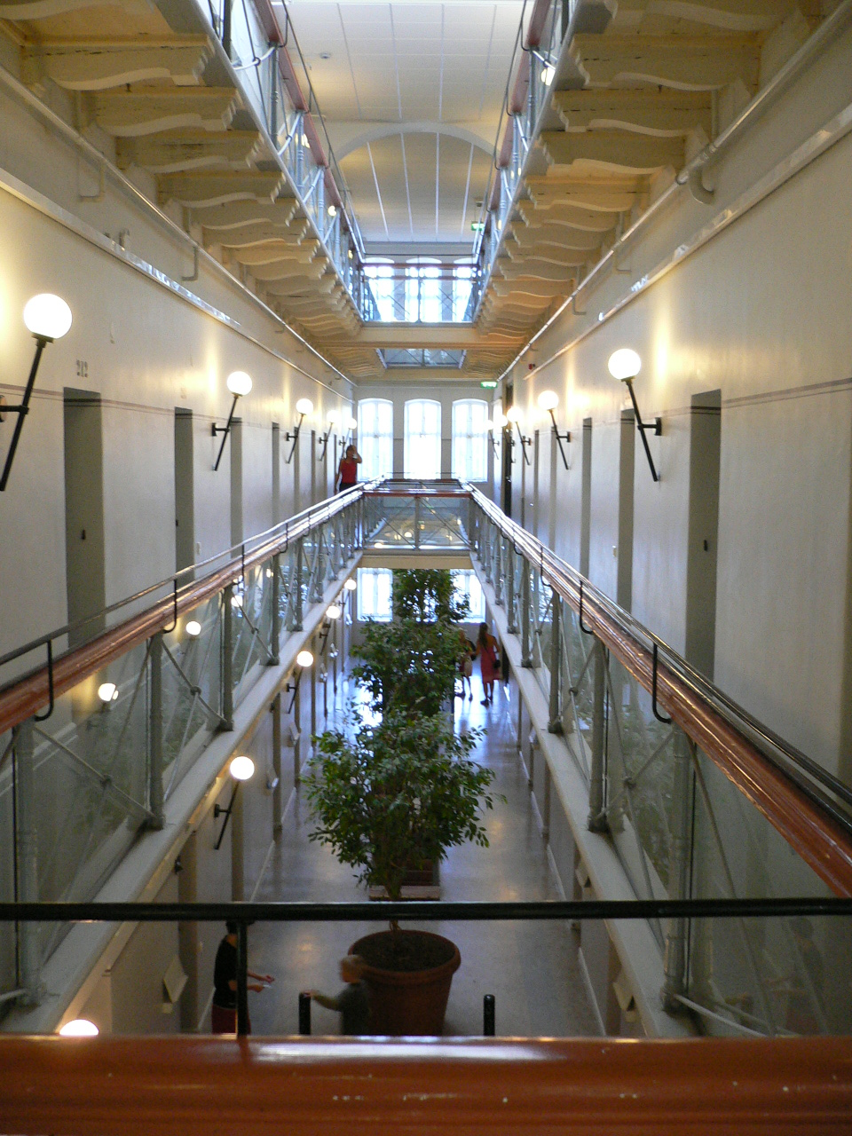 Långholmen prison.